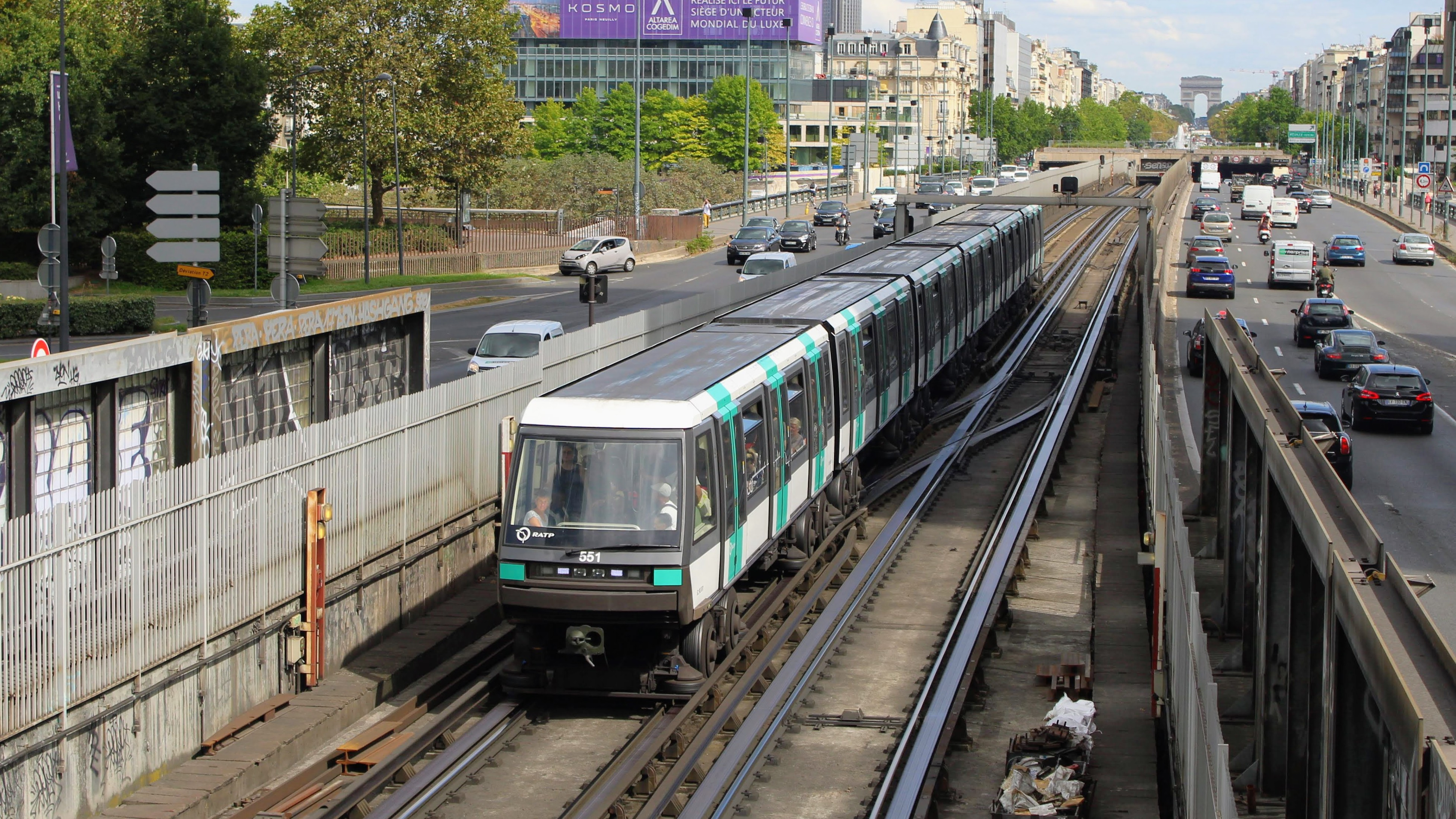 MP 05 no 551 entre le pont de Neuilly et la station Esplanade de La Défense, sur la ligne 1 du métro de Paris, France.